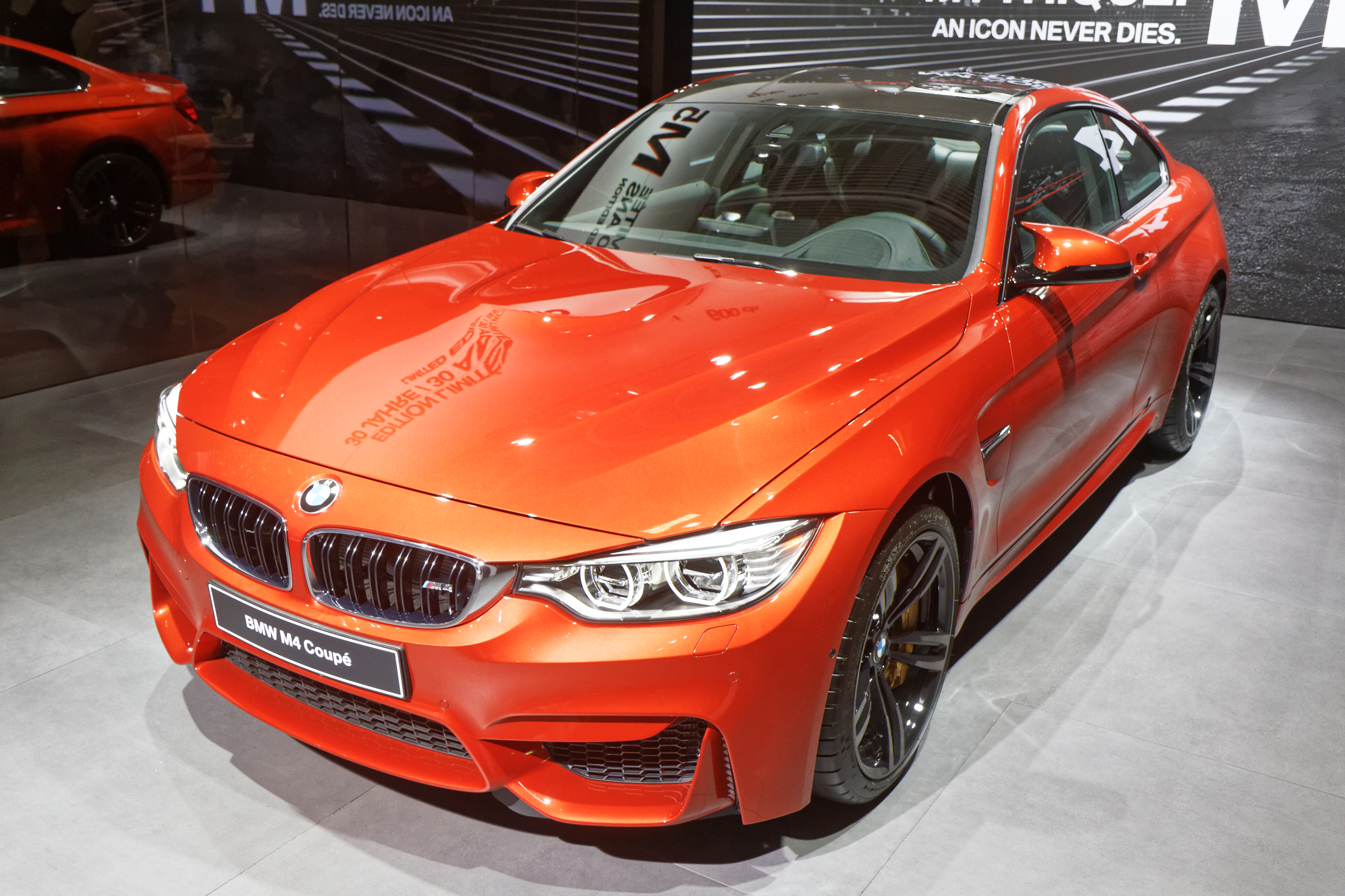 Une BMW M4 Coupé présentée lors du mondial de l'automobile de Paris 2014.